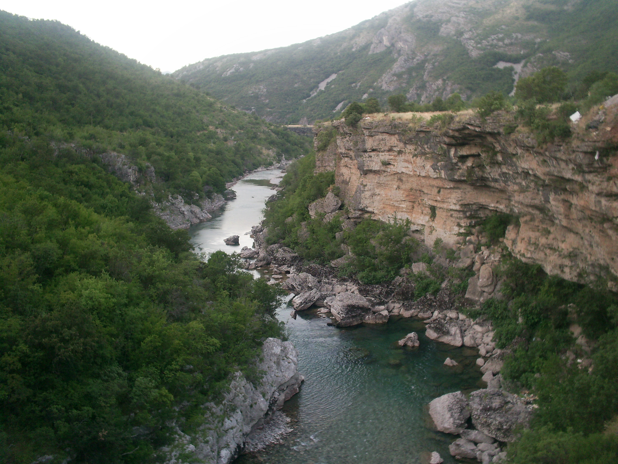 Moraca river Central Montenegro